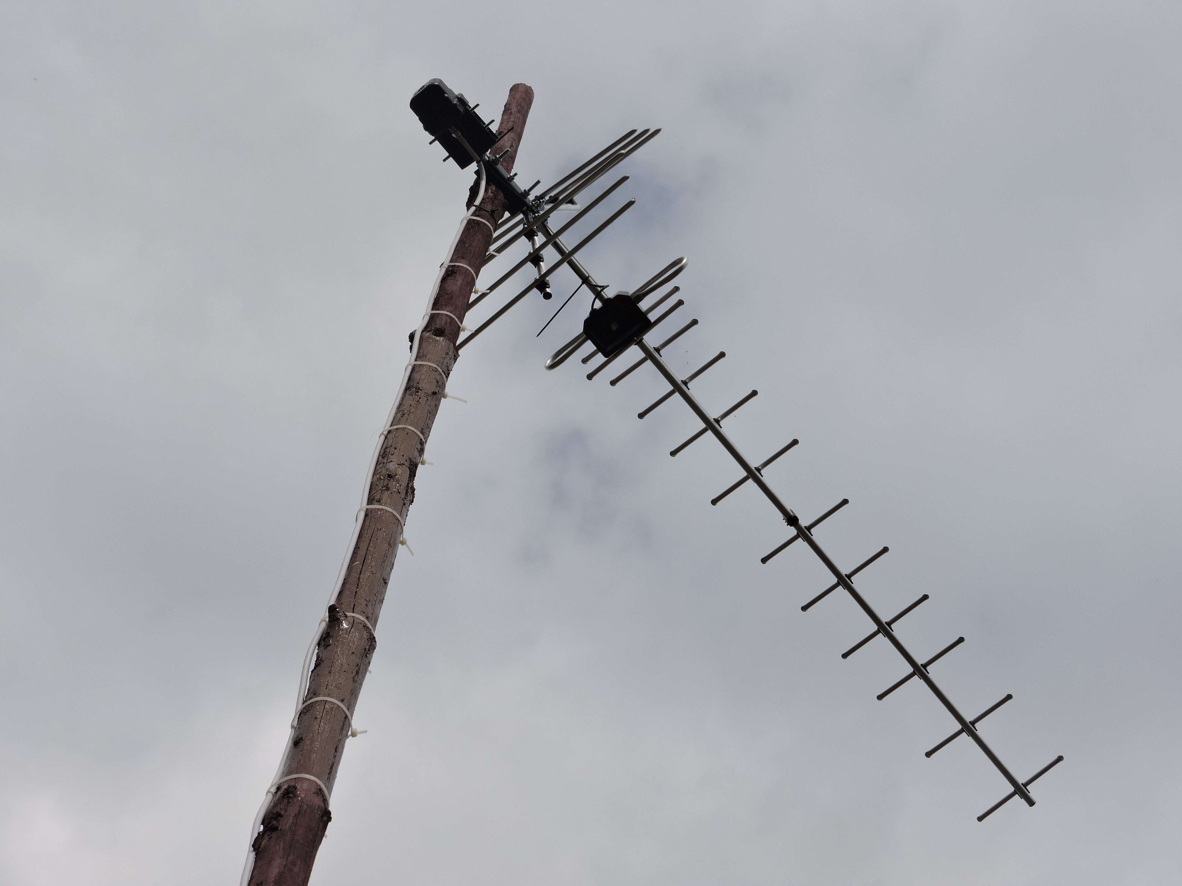 Всеволновая антенна «Дельта Н-1381» на мачте